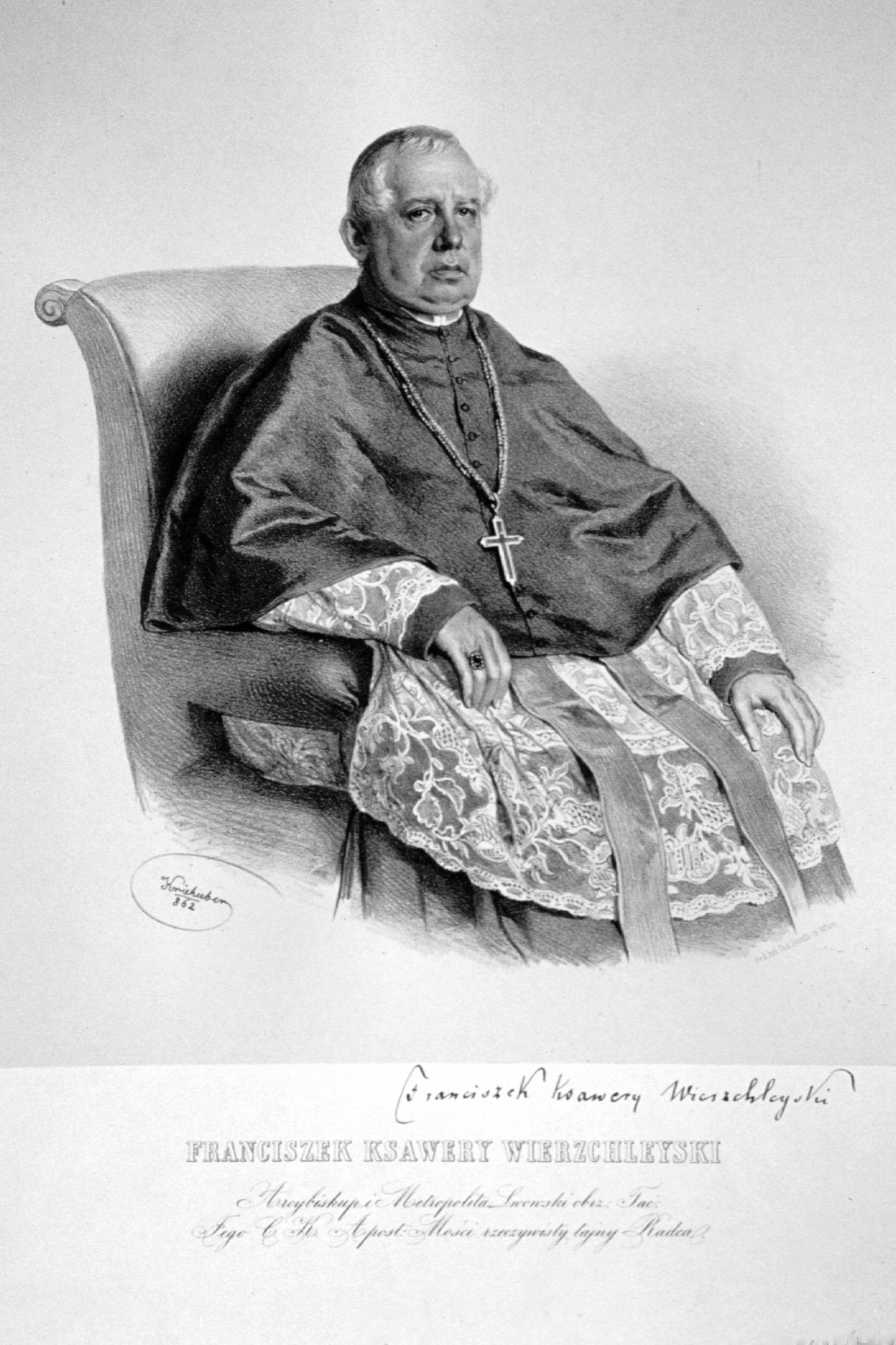 Franz Xaver Wierzchleyski (1802-1884), Metropolti und Erzbischof von Lemberg. Lithographie von Josef Kriehuber, 1862